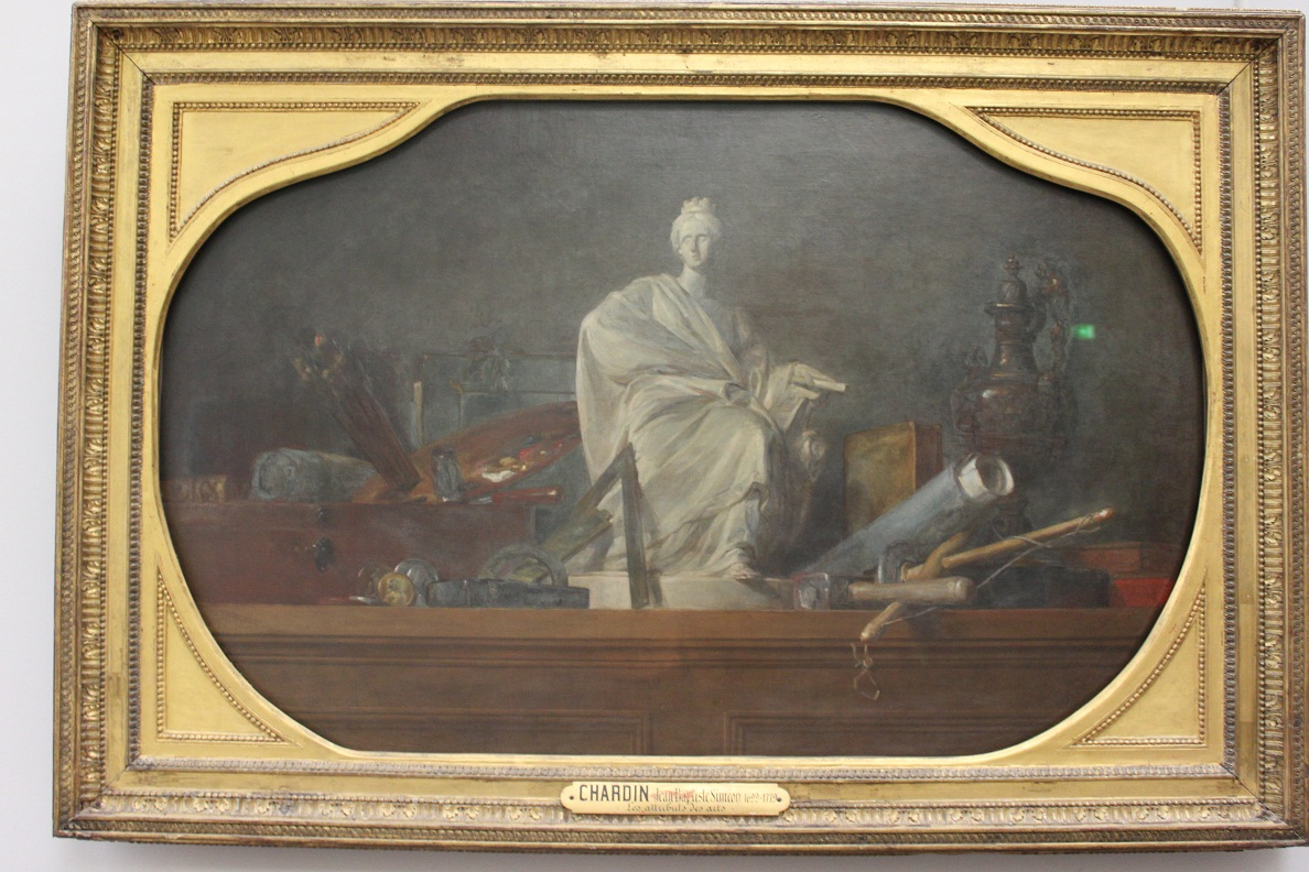 Tableau de Chardin : les Attributs des Arts (1765), à ne pas confondre avec Les attributs des Arts (1731) du même peintre